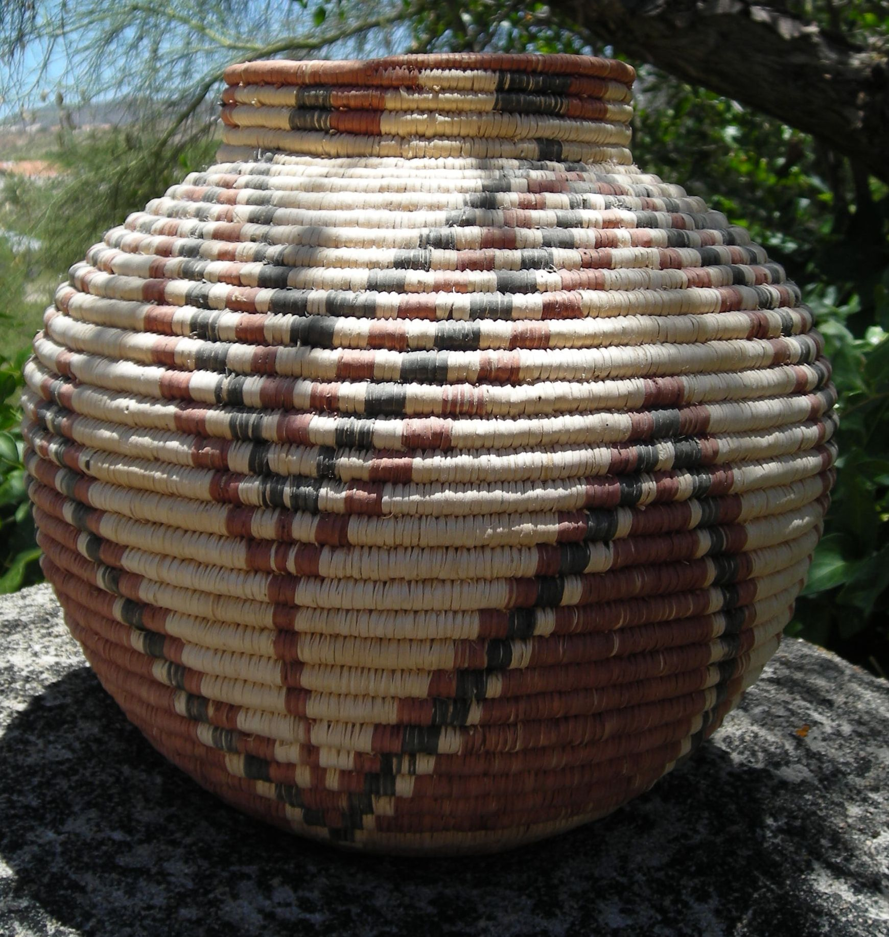 Seri olla style basket (haat hanóohcö)